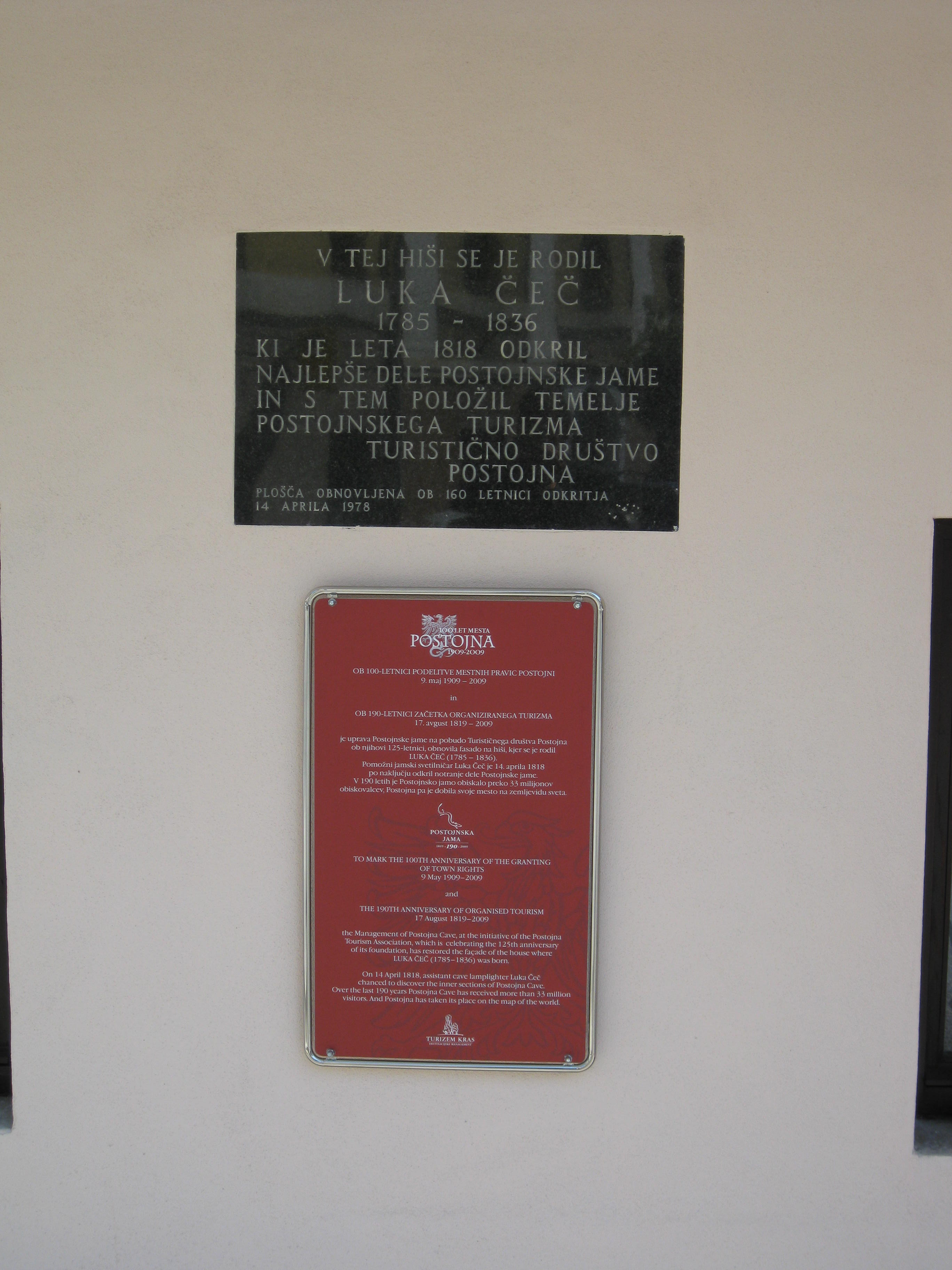 Gedenktafeln am Geburtshaus von Luka Cec, dem Entdecker der Höhle in Postojna, Slowenien